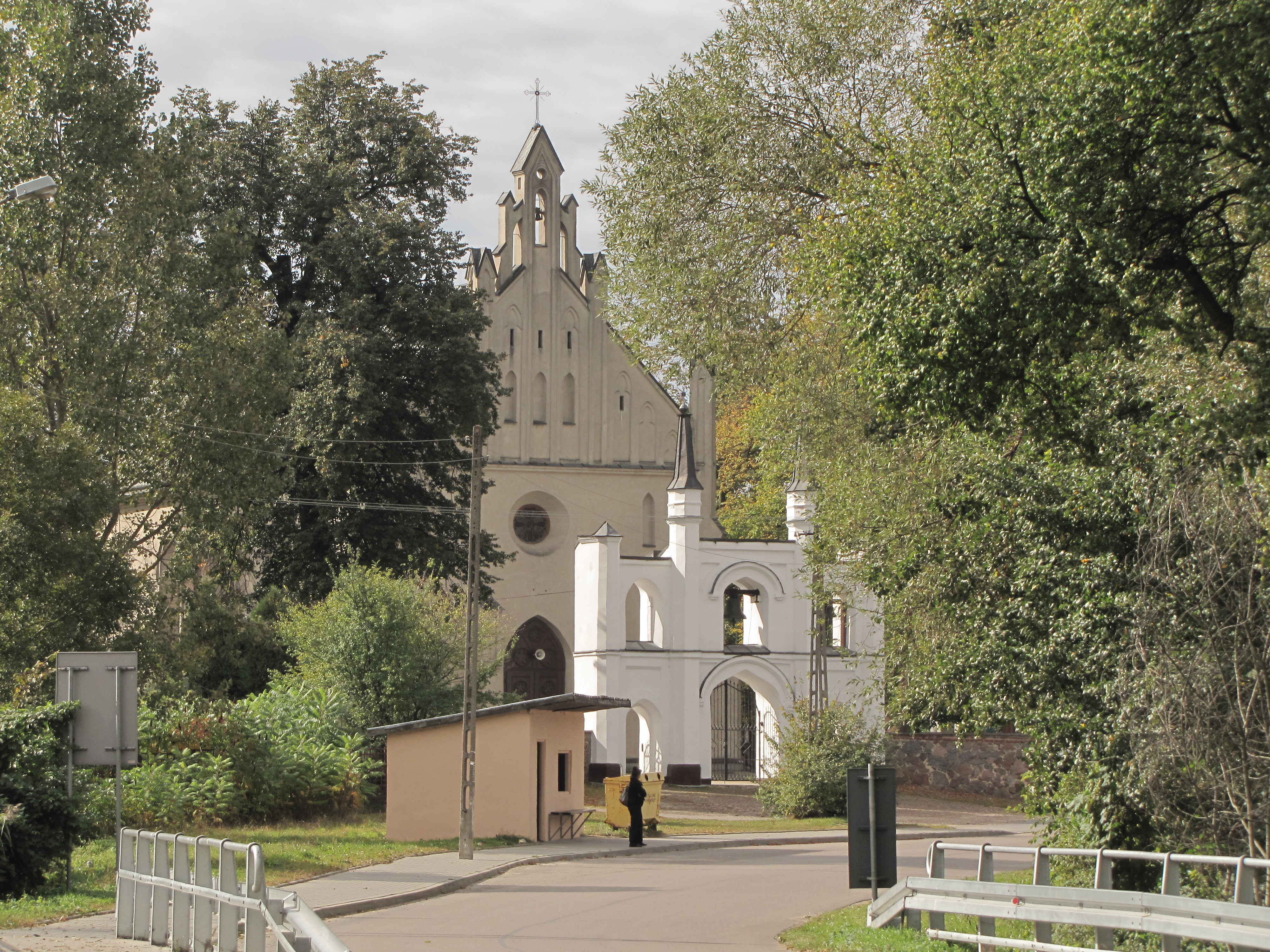 Huszlew - zespół kościoła parafialnego p.w. św. Antoniego Padewskiego, XIX (zabytek nr /A-186)